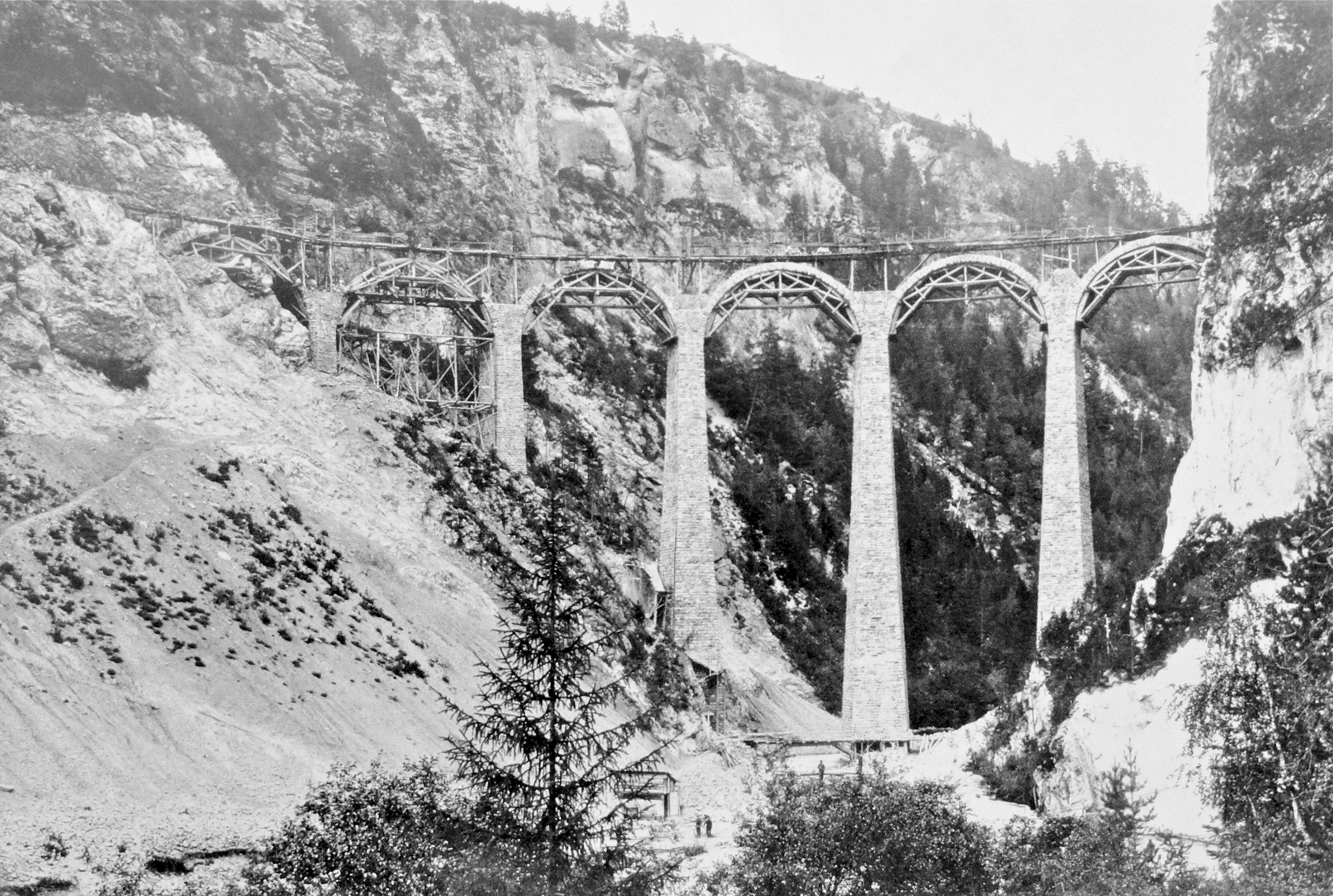 Landwasserviadukt September 1902